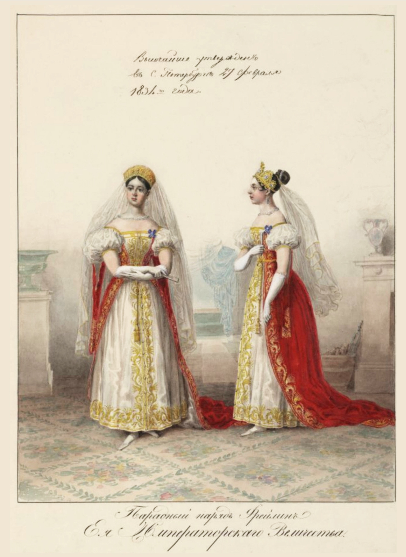 Придворные дамские наряды Фрейлины императрицы должны были появляться в красном "сарафане" с белой юбкой, золотым шитьем и резным золотым кокошником диадемой